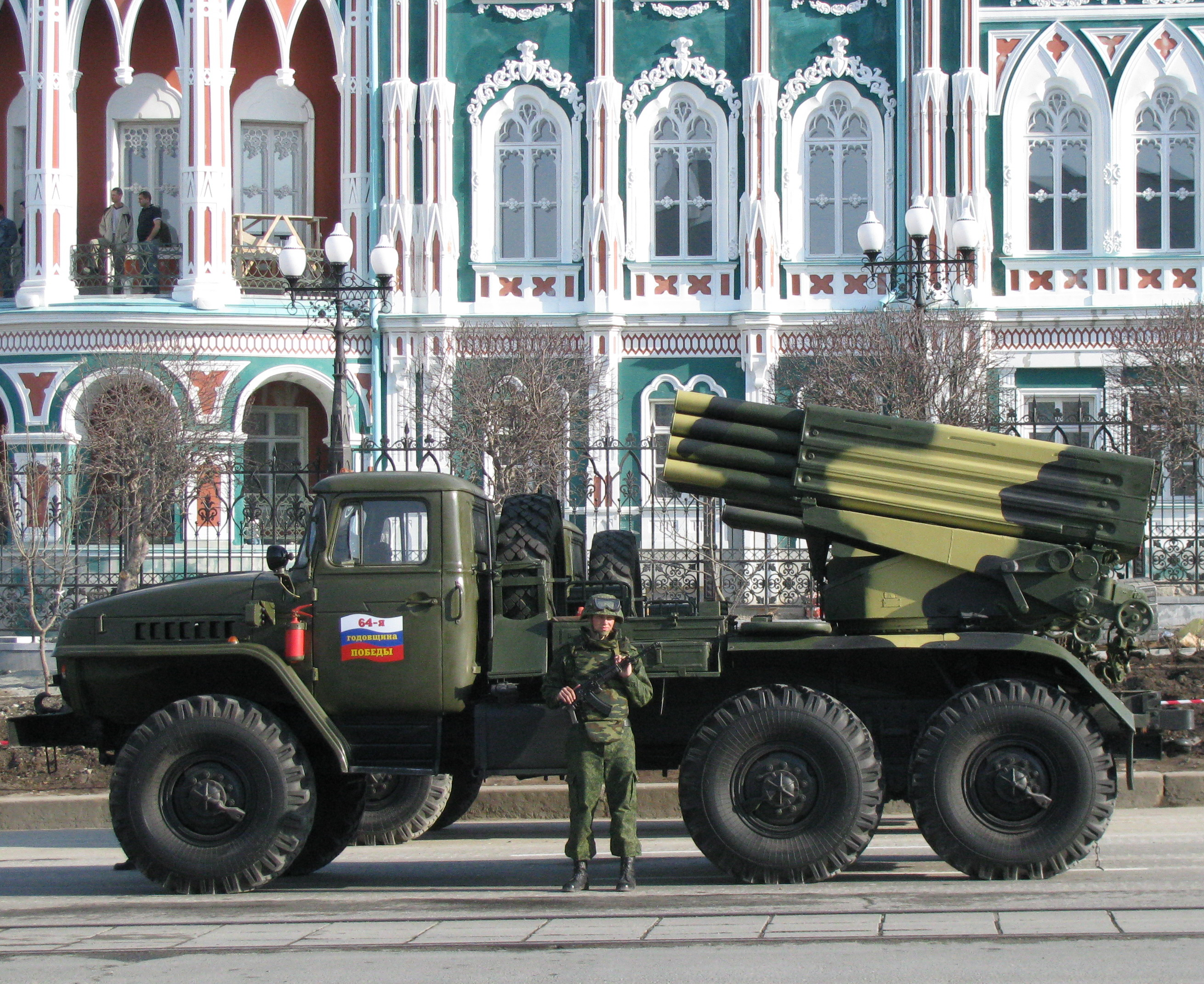 ЗРК "Град" перед выходом на площадь 1905 года.